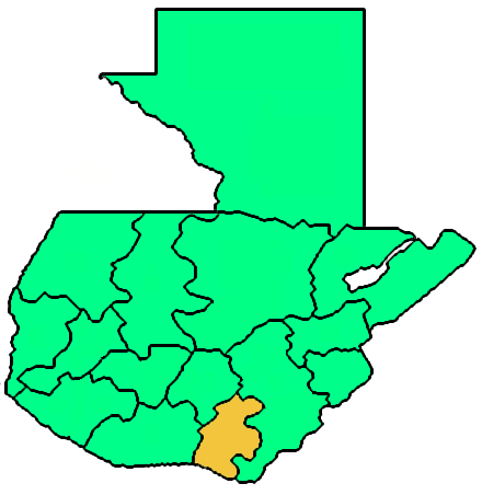 Mappa della diocesi cattolica di Santa Rosa da Lima, in Guatemala. Lavoro personale eseguito a partire da questa immagine di Commons. Fonte per i confini delle diocesi